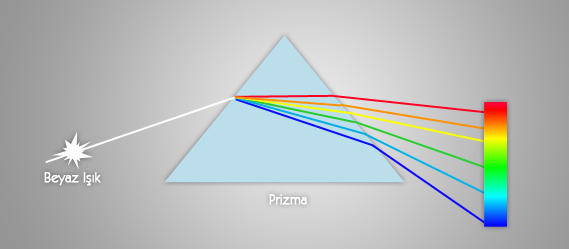 Sürekli Spekturum